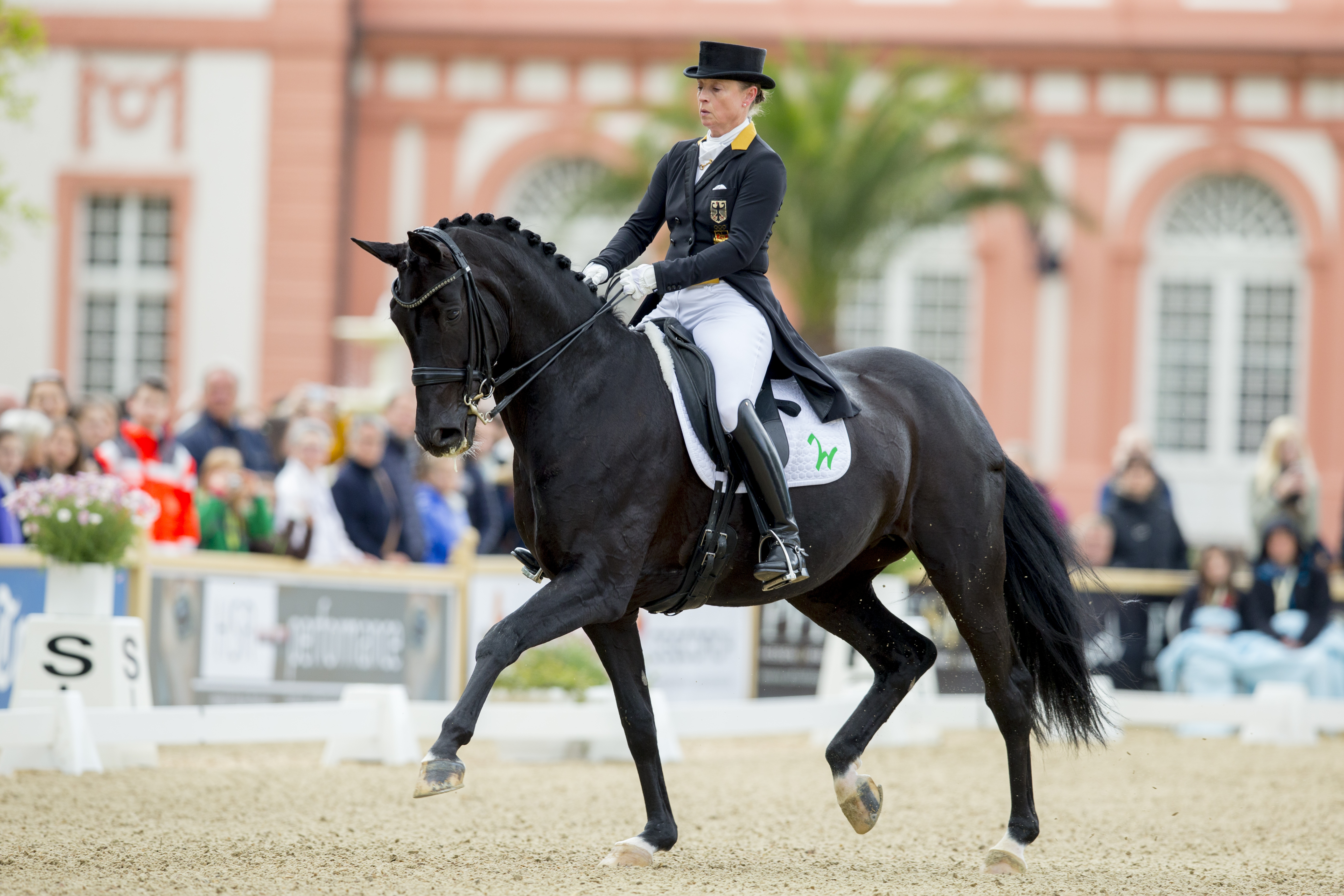 Isabell Werth and Weihegold, GPS winners (Photo: WRFC/Lafrentz)